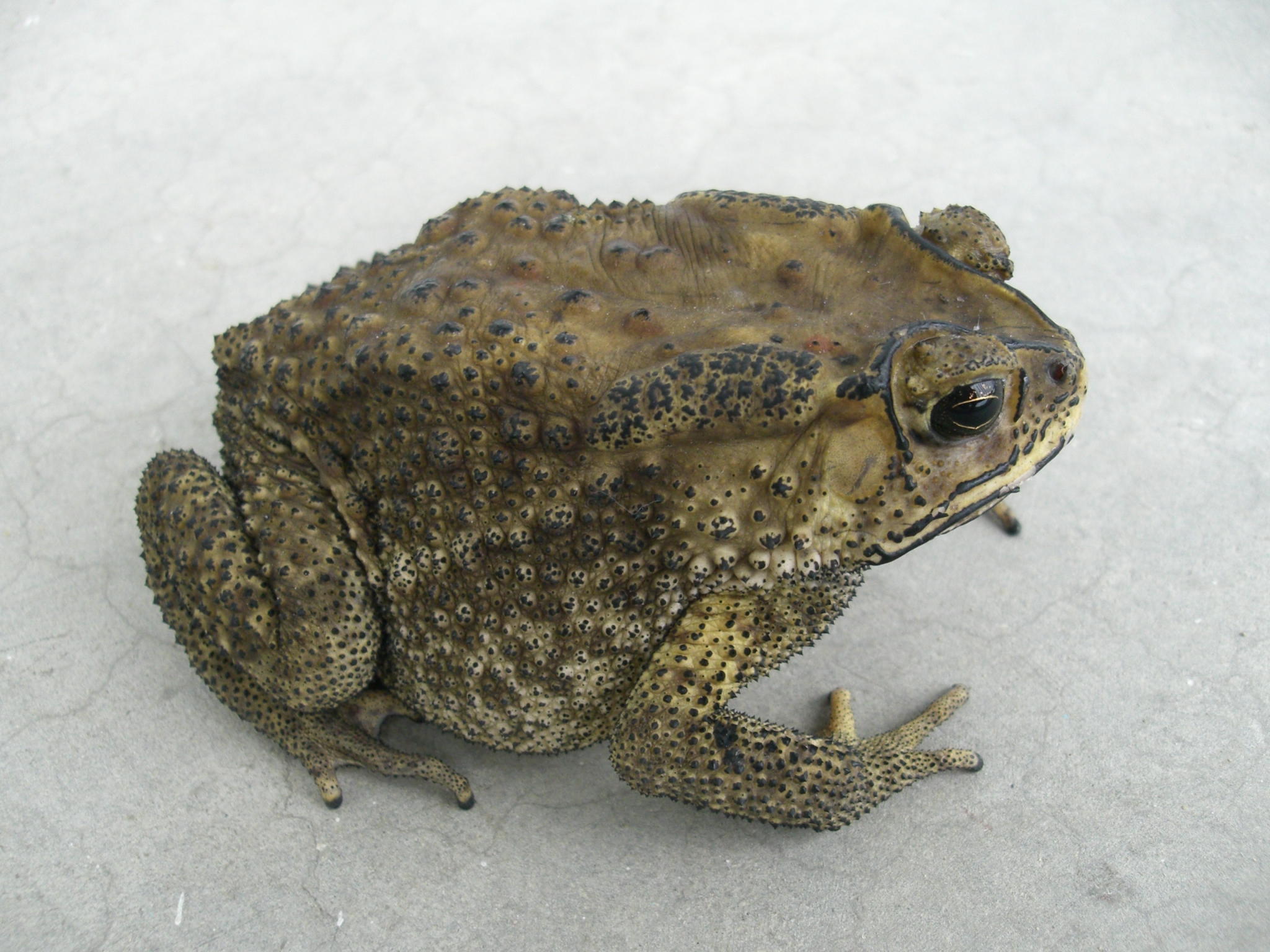 A Toad in Samut Prakarn, Thailand